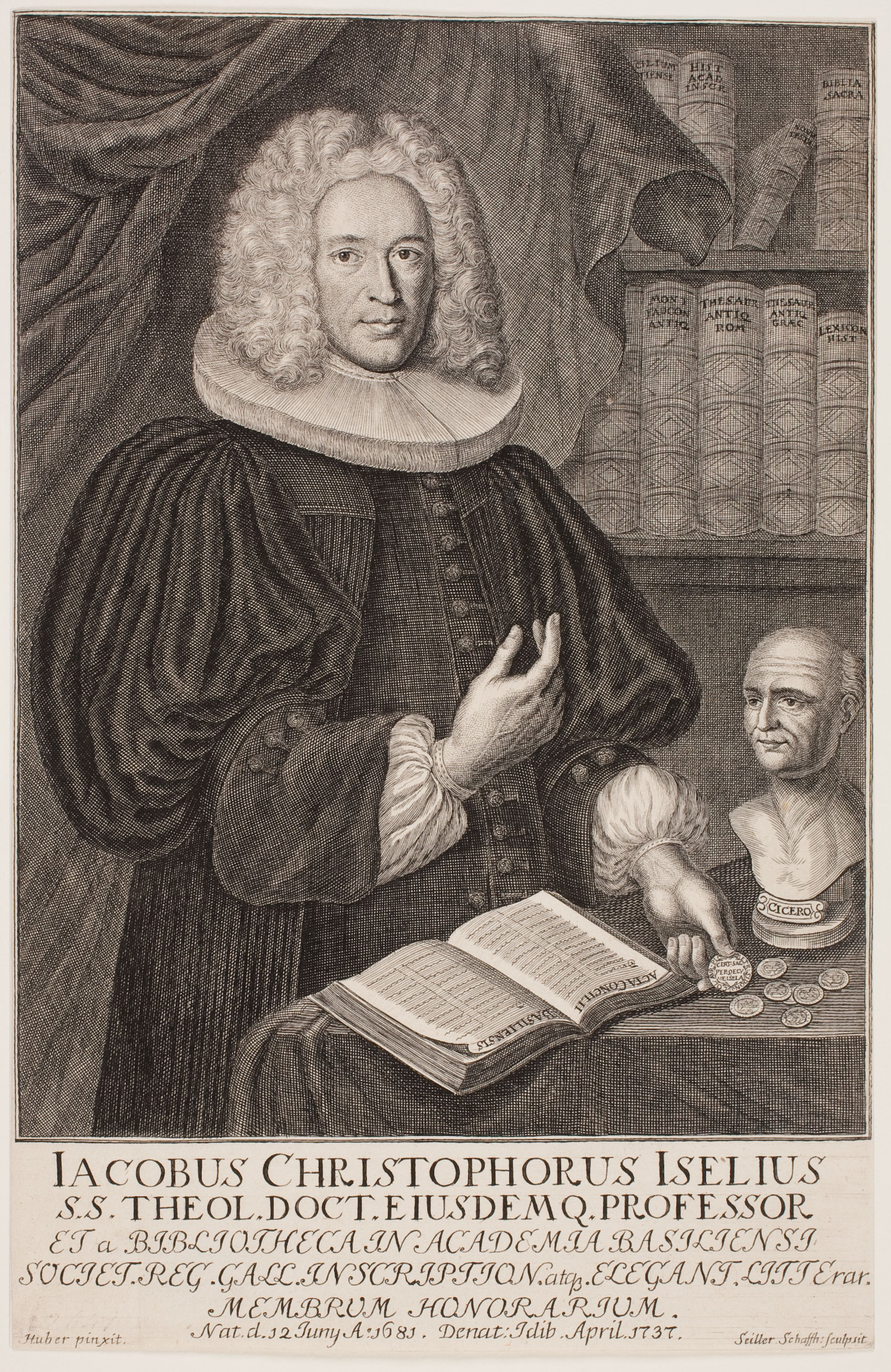 Bildnis Jacob Christoph Iselin